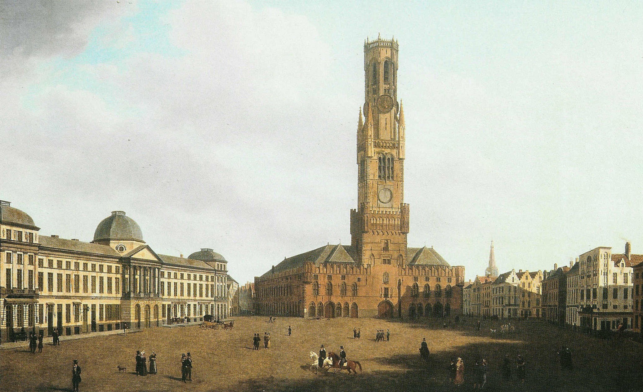 Brugge (Belgium) - Provinciaal hof voor de brand van 1878